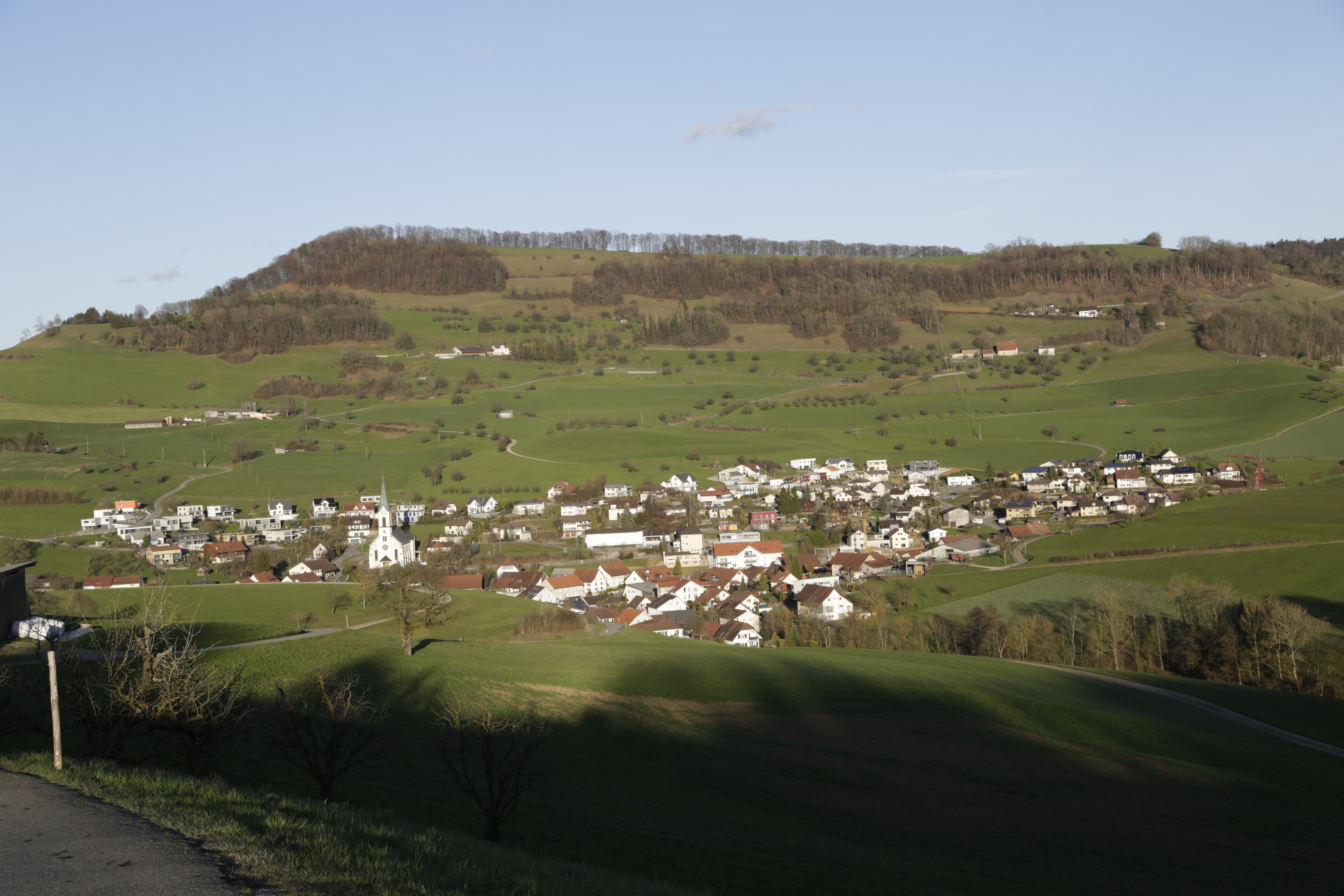 Blick auf den Ort Gansingen, Hauptort der gleichnamigen Aargauer Gemeinde